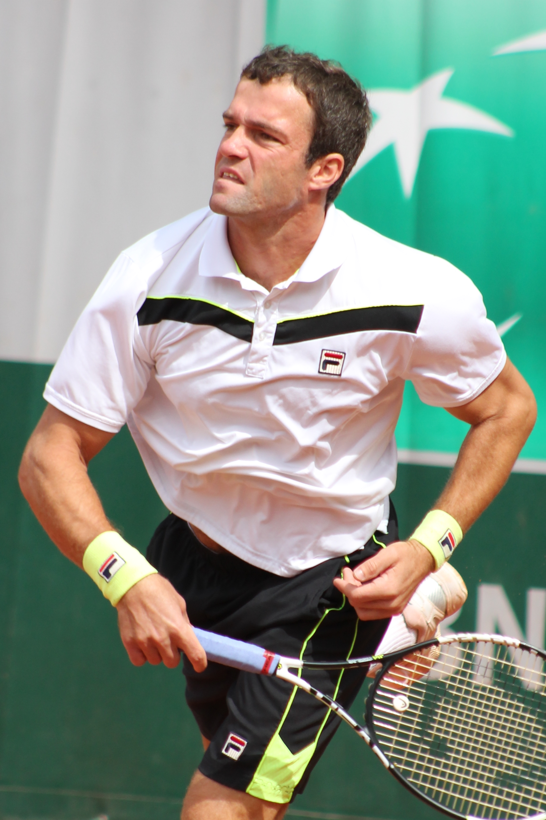 Gabashvili RG15 (14)